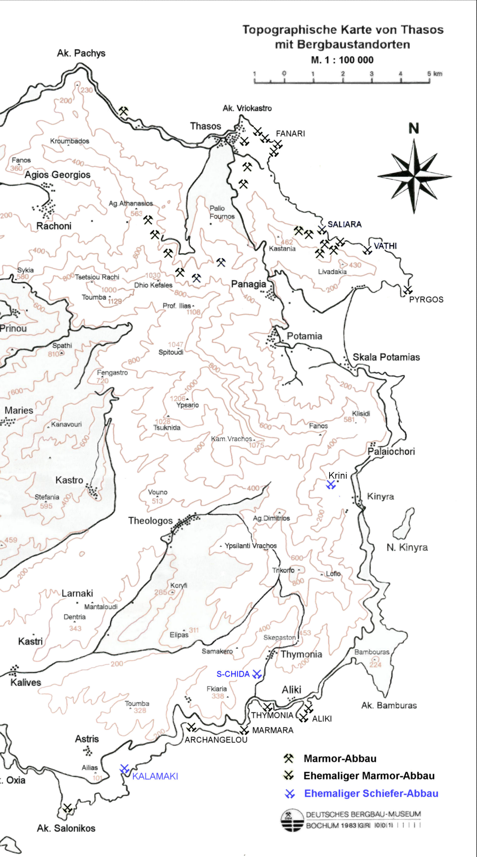 Marmor- und Gneisabbau auf Thasos